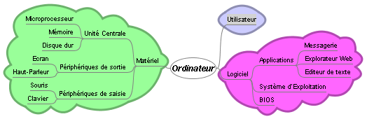 Exemple de Mindmap faites avec FreeMind (GNU GPL).